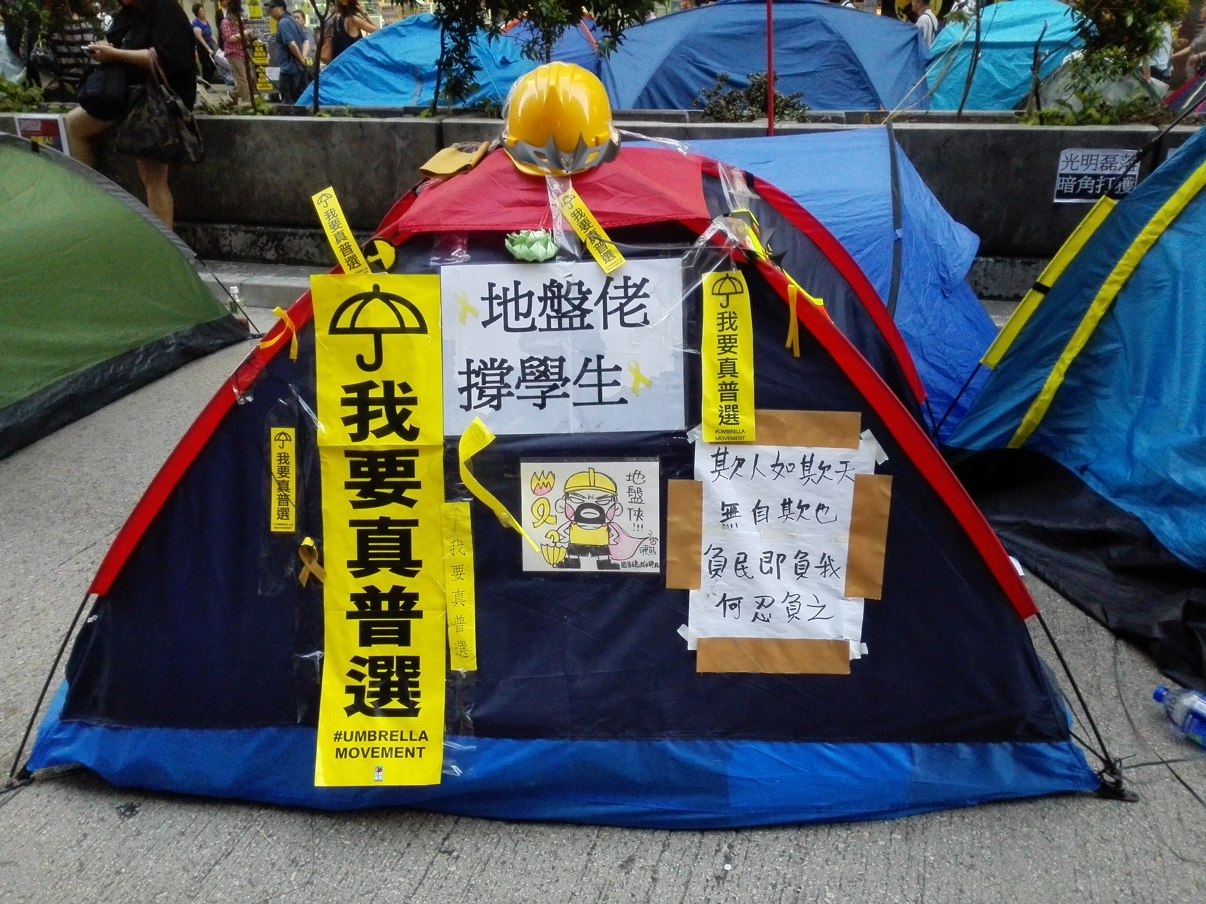 地盘佬撑学生